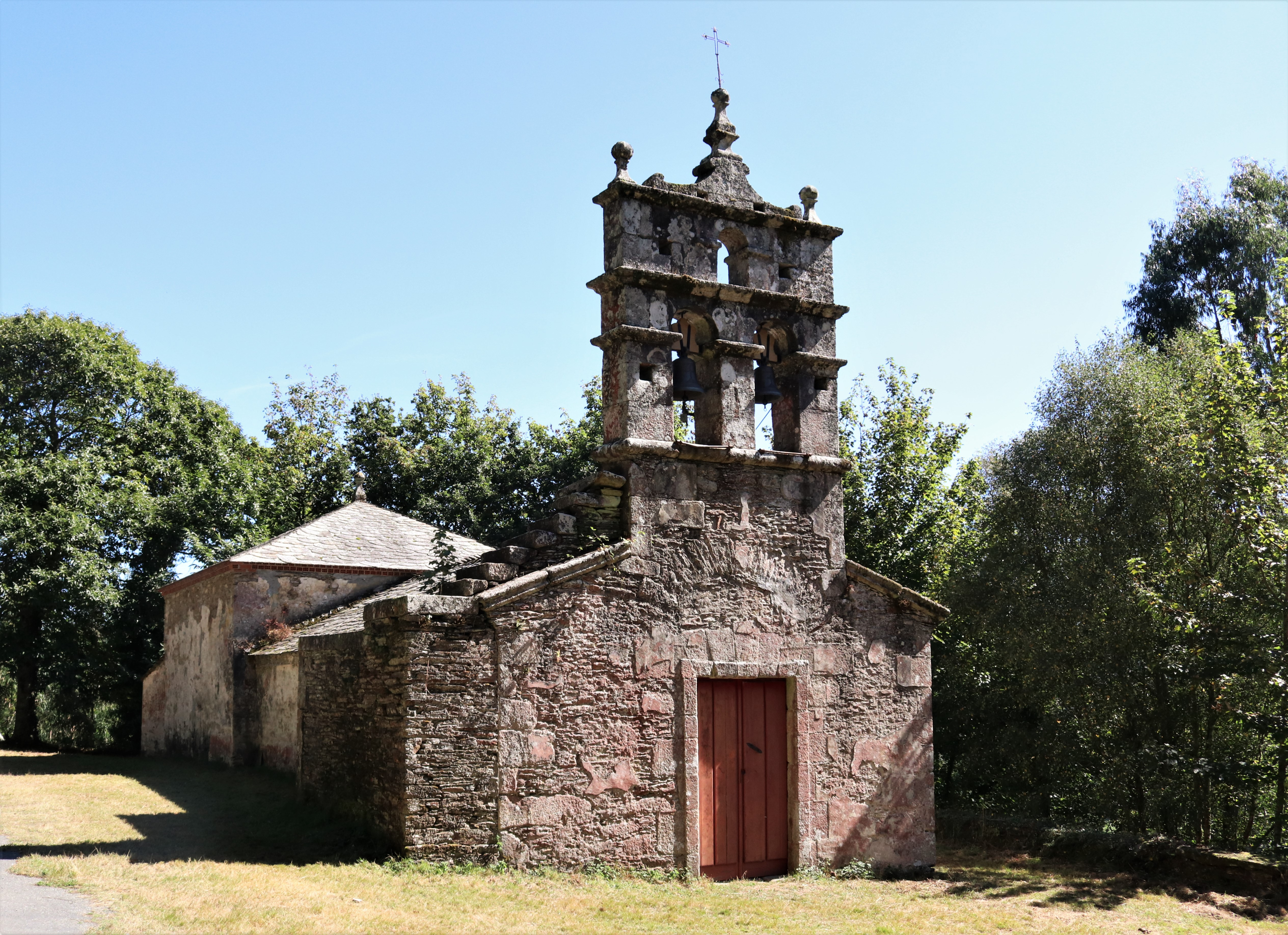 Igrexa das Goás, Abadín.